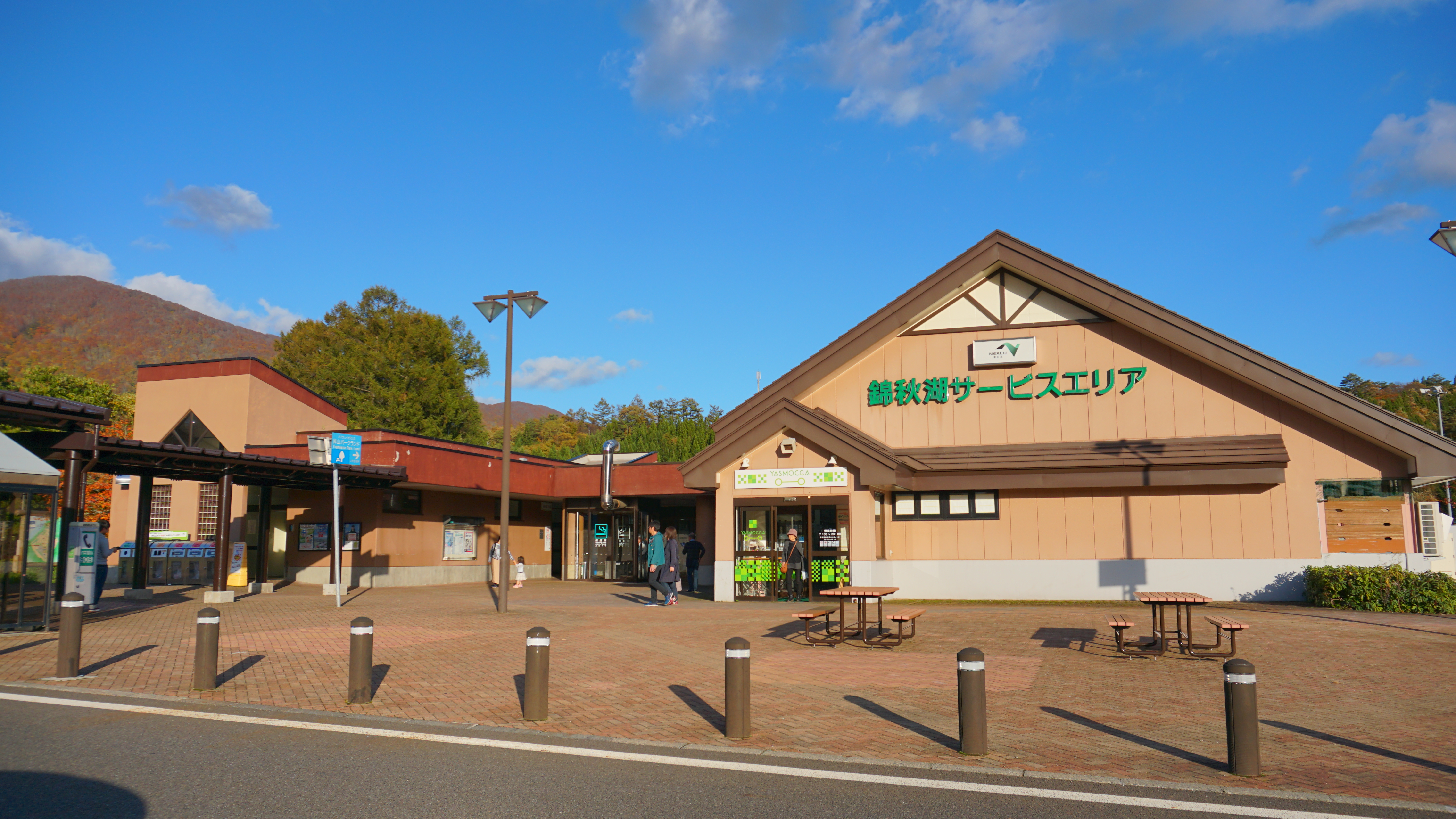 錦秋湖サービスエリア（秋田自動車道、岩手県湯田町）下り線施設